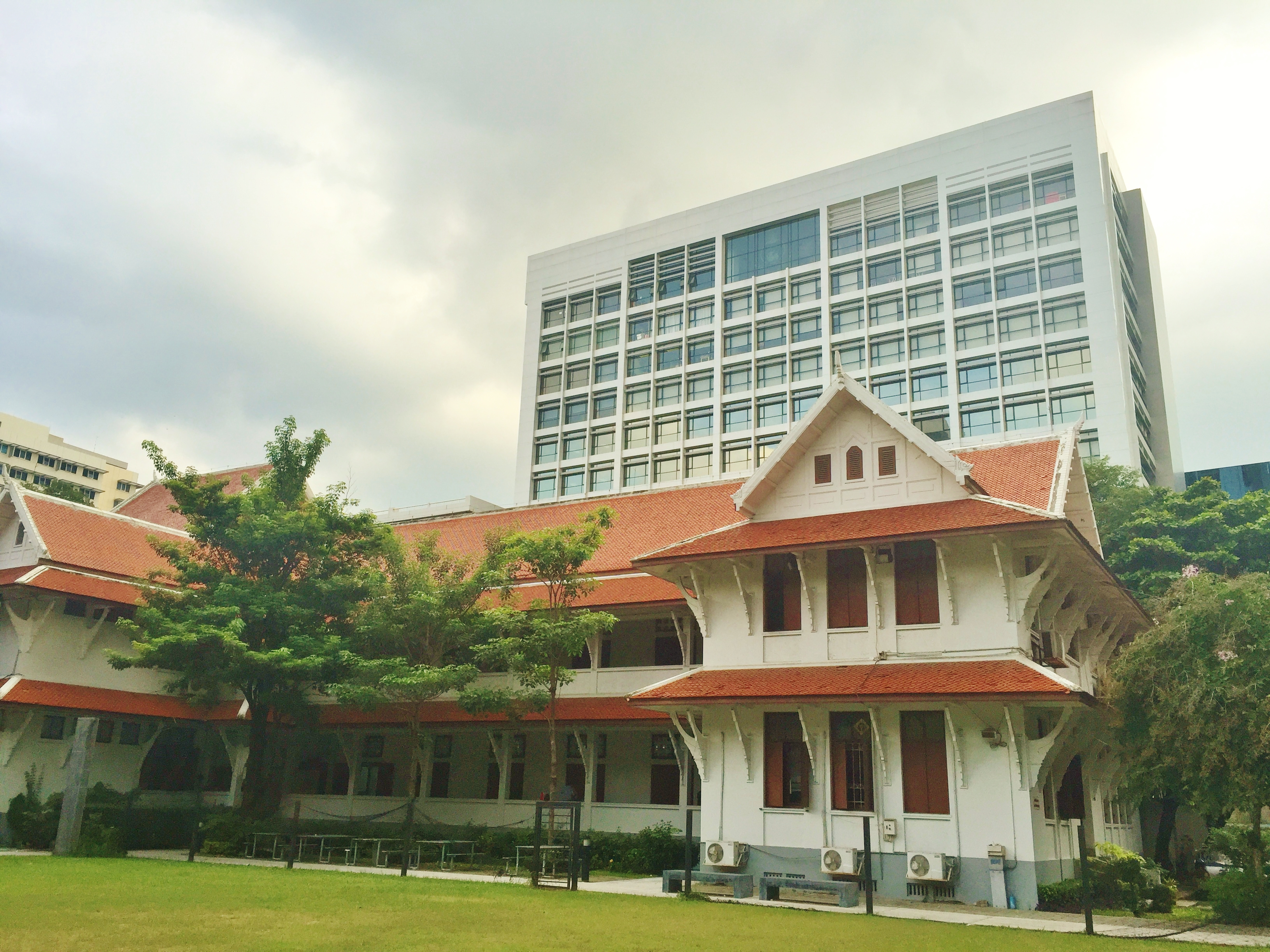 ด้านหน้าคืออาคารสำราญราษฎร์บริรักษ์ ส่วนอาคารสูงด้านหลังคืออาคารเกษม อุทยานินหลังใหม่